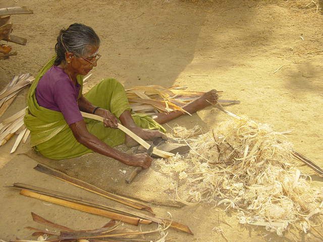 பனையோலையில் இருந்து நார் வழிக்கப்பெற்று பெட்டிக்குத் தயார் செய்யப் பெறுகிறது.